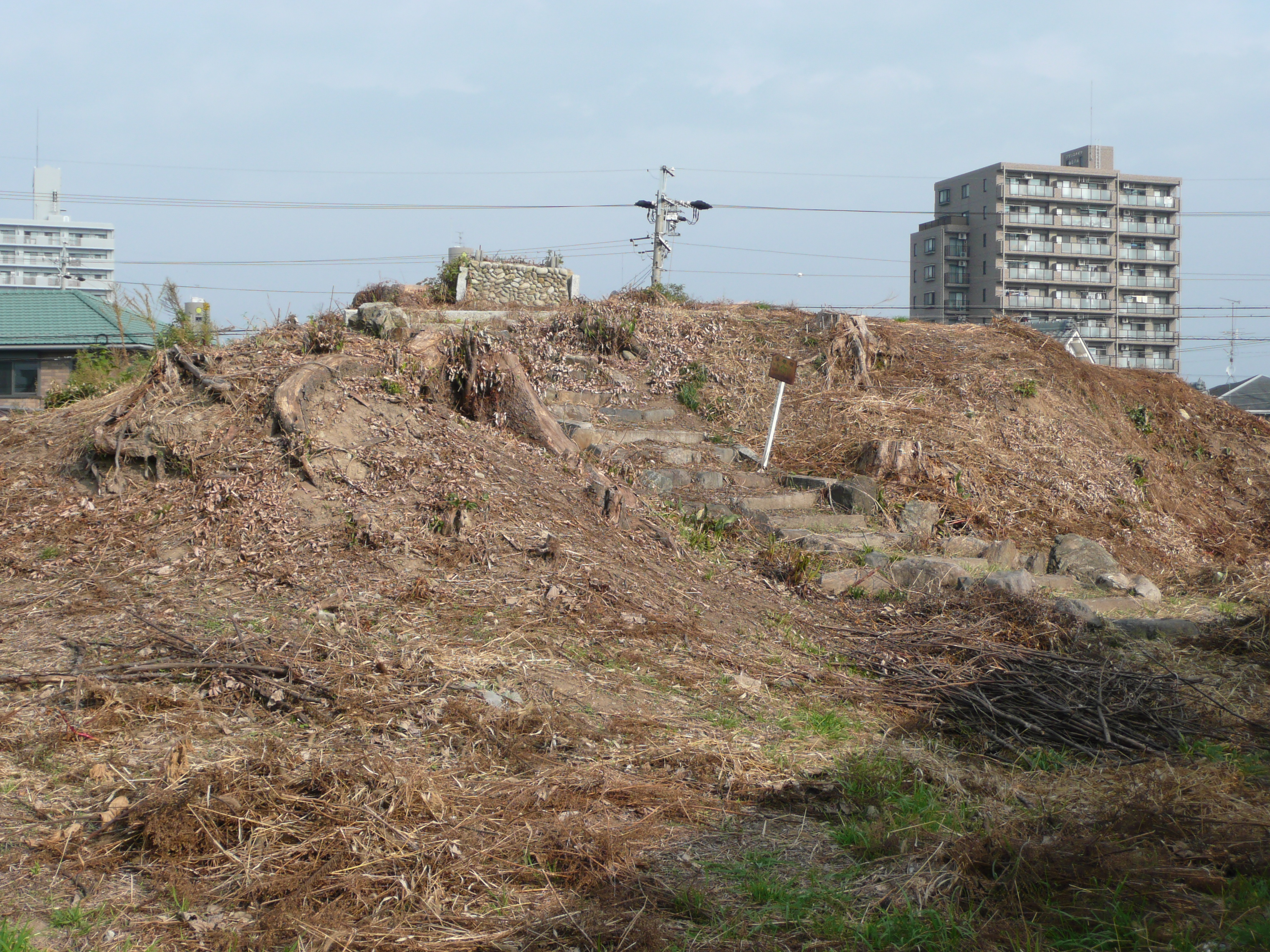 上条城の櫓台。